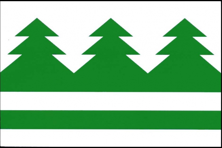 Poběžovice u Holic